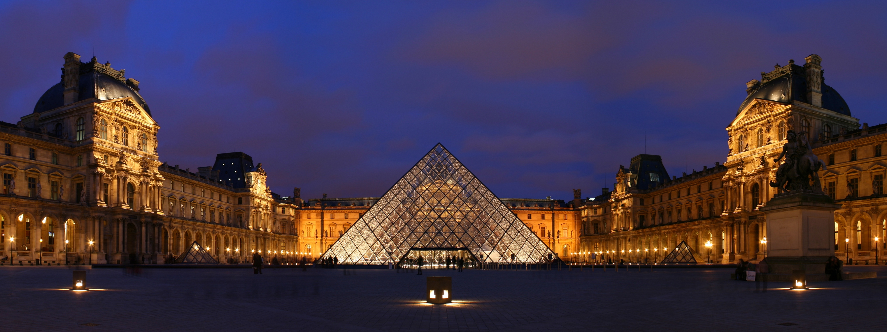 La pyramide du Louvre, au coucher de soleil. Ce panorama est constitué de trois photos collées ensemble avec Hugin.